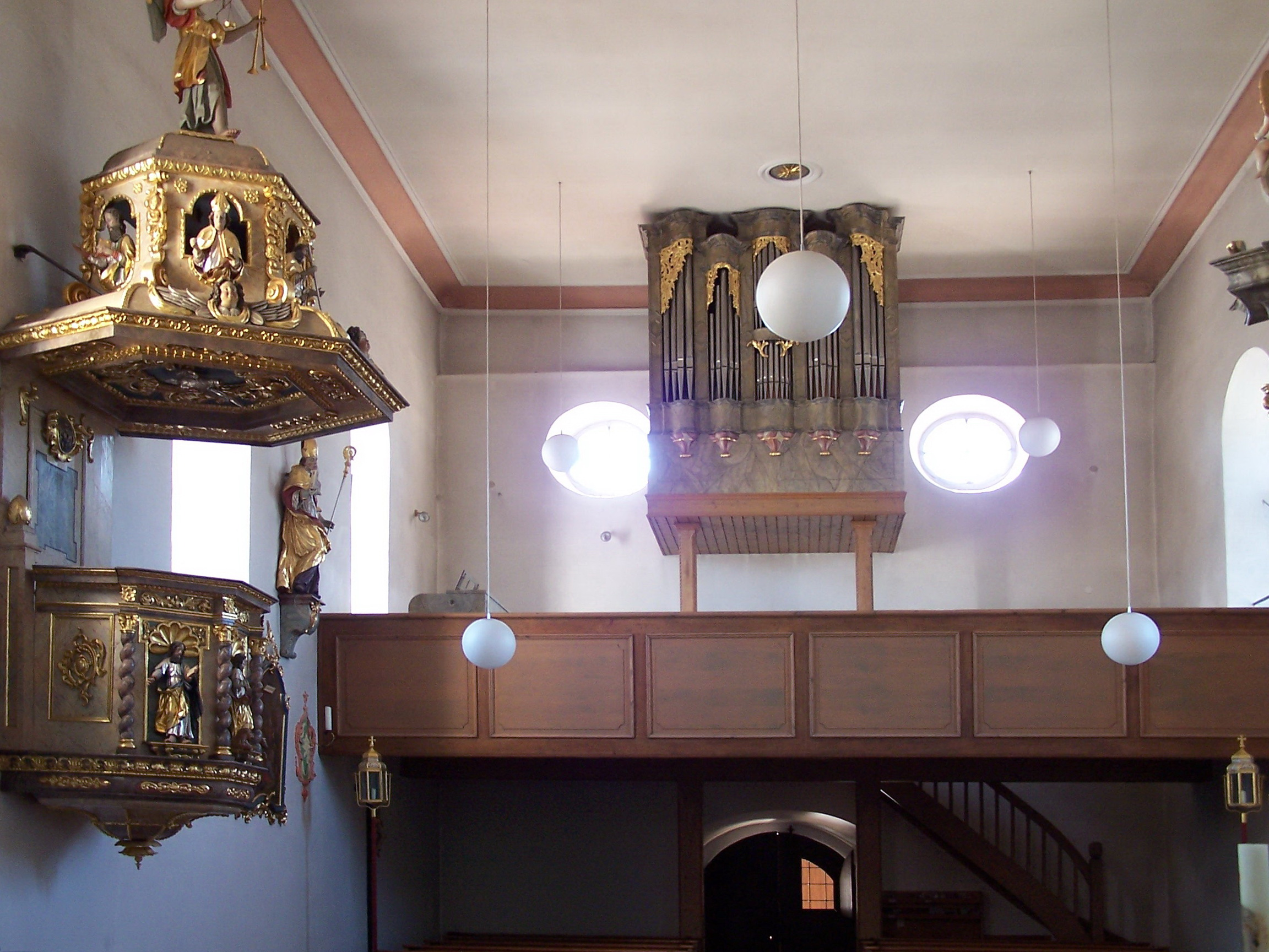 Sandsbach, Am Kirchberg 3; Am Kirchberg 2. Katholische Pfarrkirche St. Petrus. Das Langhaus umfasst drei Fensterachsen und Flachdecke mit Täfelung. Die Umfassungsmauern des Langhauses lassen im oberen Teil eine spätere Erhöhung erkennen. Holzfigur an der Südwand, St. Wolfgang. Einfache Orgelempore.